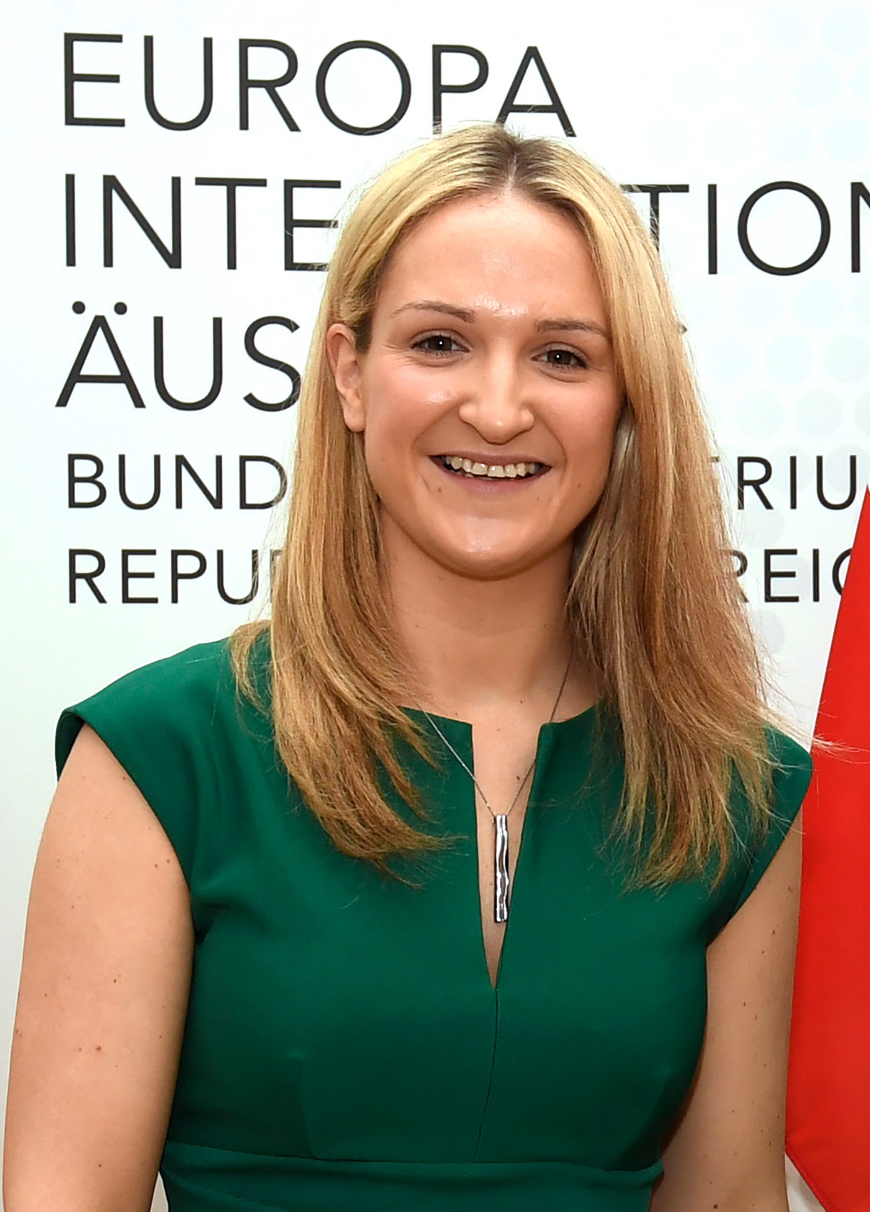 Am Freitag, den 16. März 2018, empfing Bundesministerin Karin Kneissl der Europaministerin von Irland Helen McEntee, zu einem Arbeitsgespräch in Wien.Foto: Mahmoud